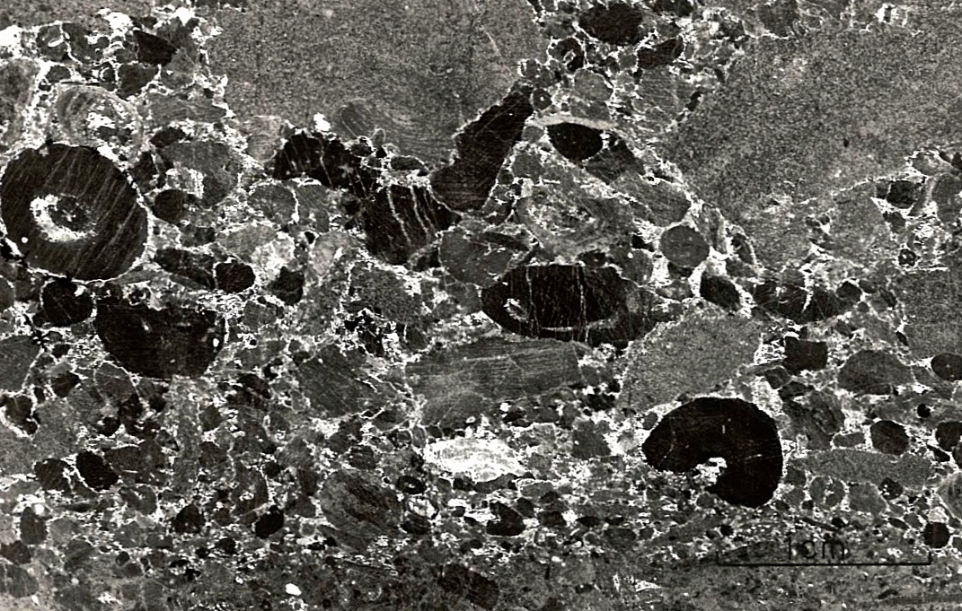 Folienabzug eines Kalksteins (Elbingeröder Komplex, Harz), hämatitschüssiger Riffschutt (Krockstein bei Rübeland)